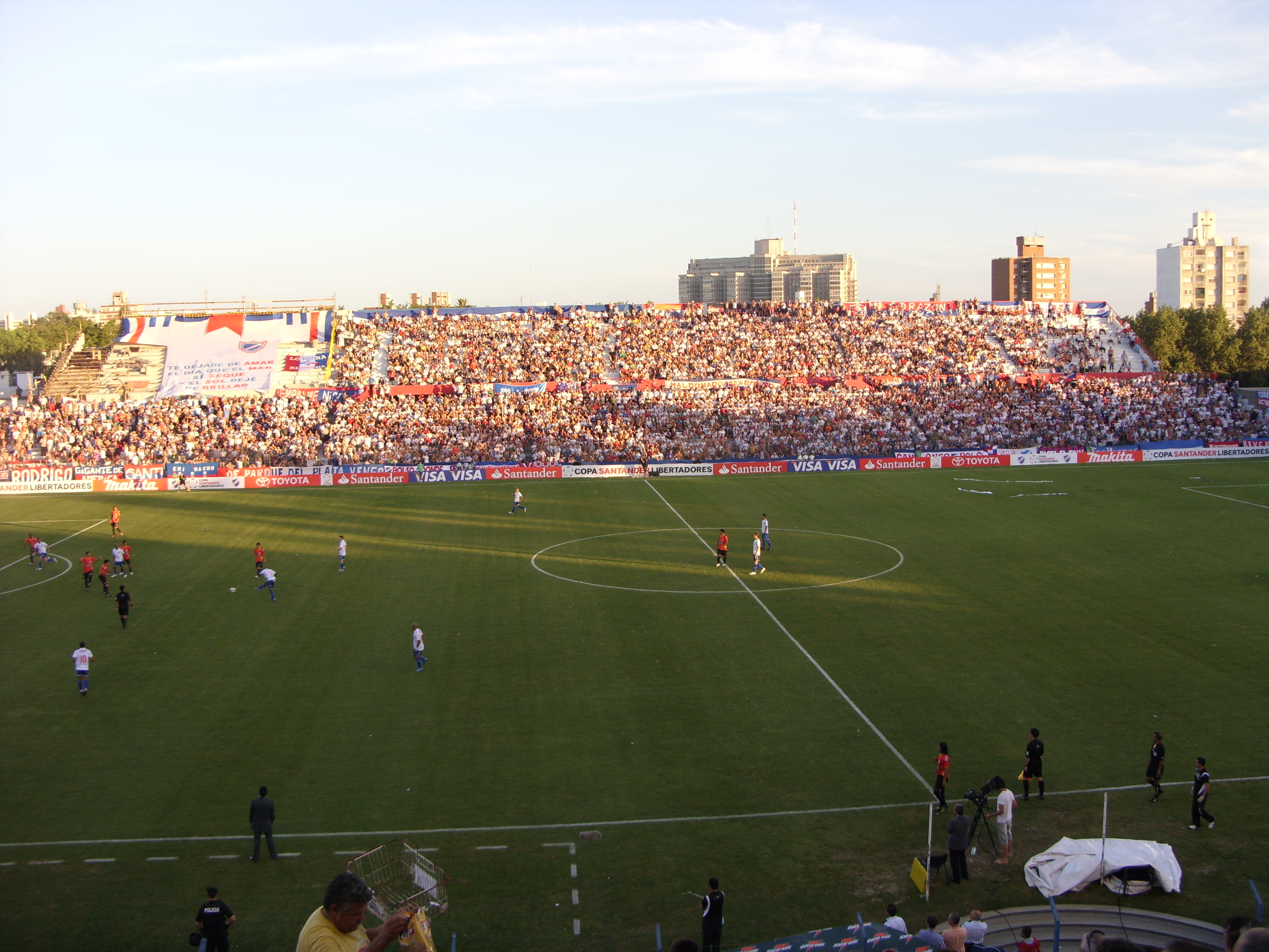 Imagen del partido entre Nacional y Deportivo Cuenca, disputado en el Estadio Gran Parque Central por la Copa Libertadores 2010